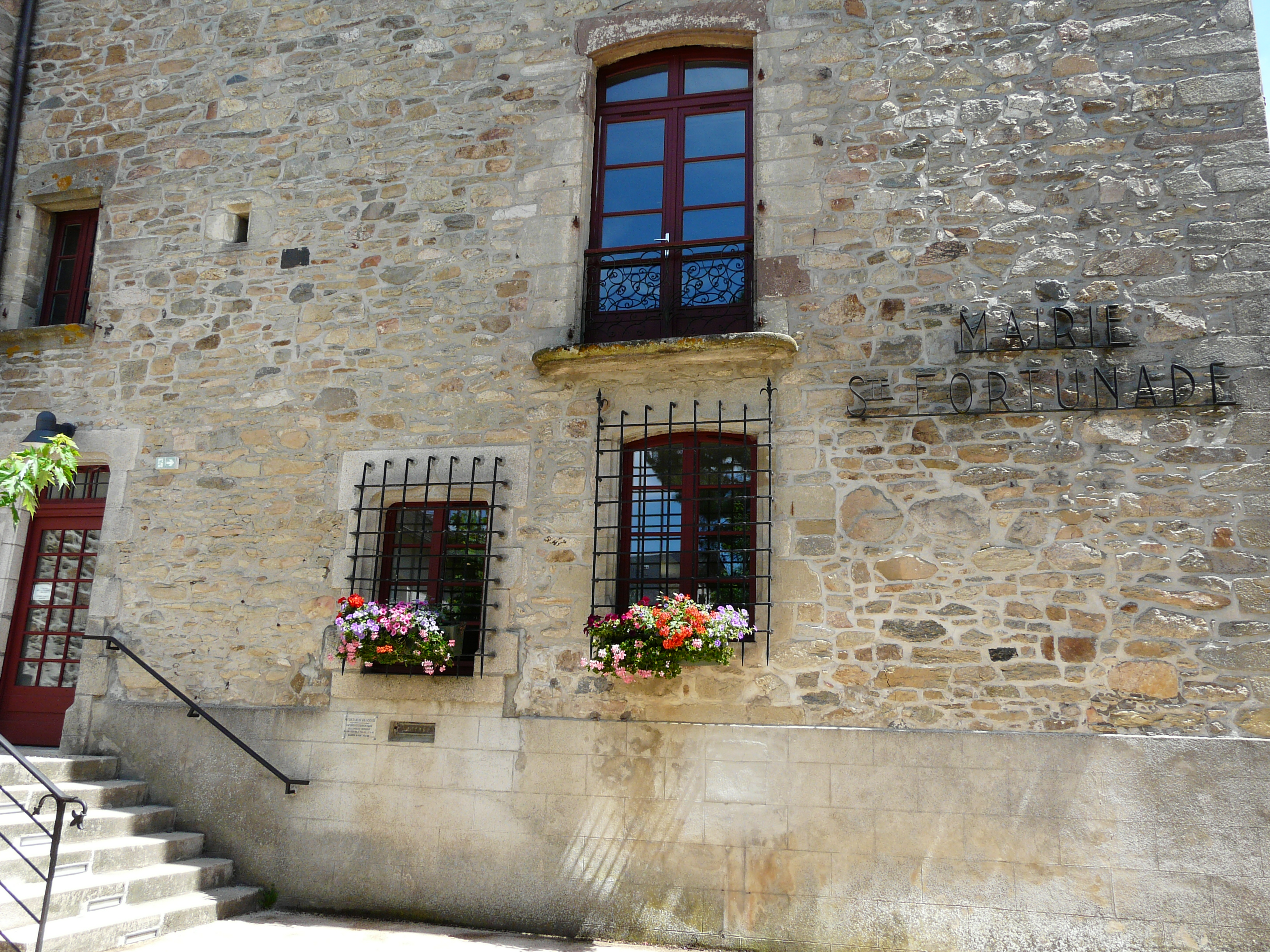 Les locaux de la mairie situés dans le château de Sainte-Fortunade, Corrèze, France.